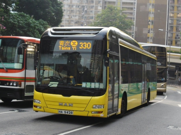 中文（香港）: 珀麗灣巴士NR330線，正前往青衣總站